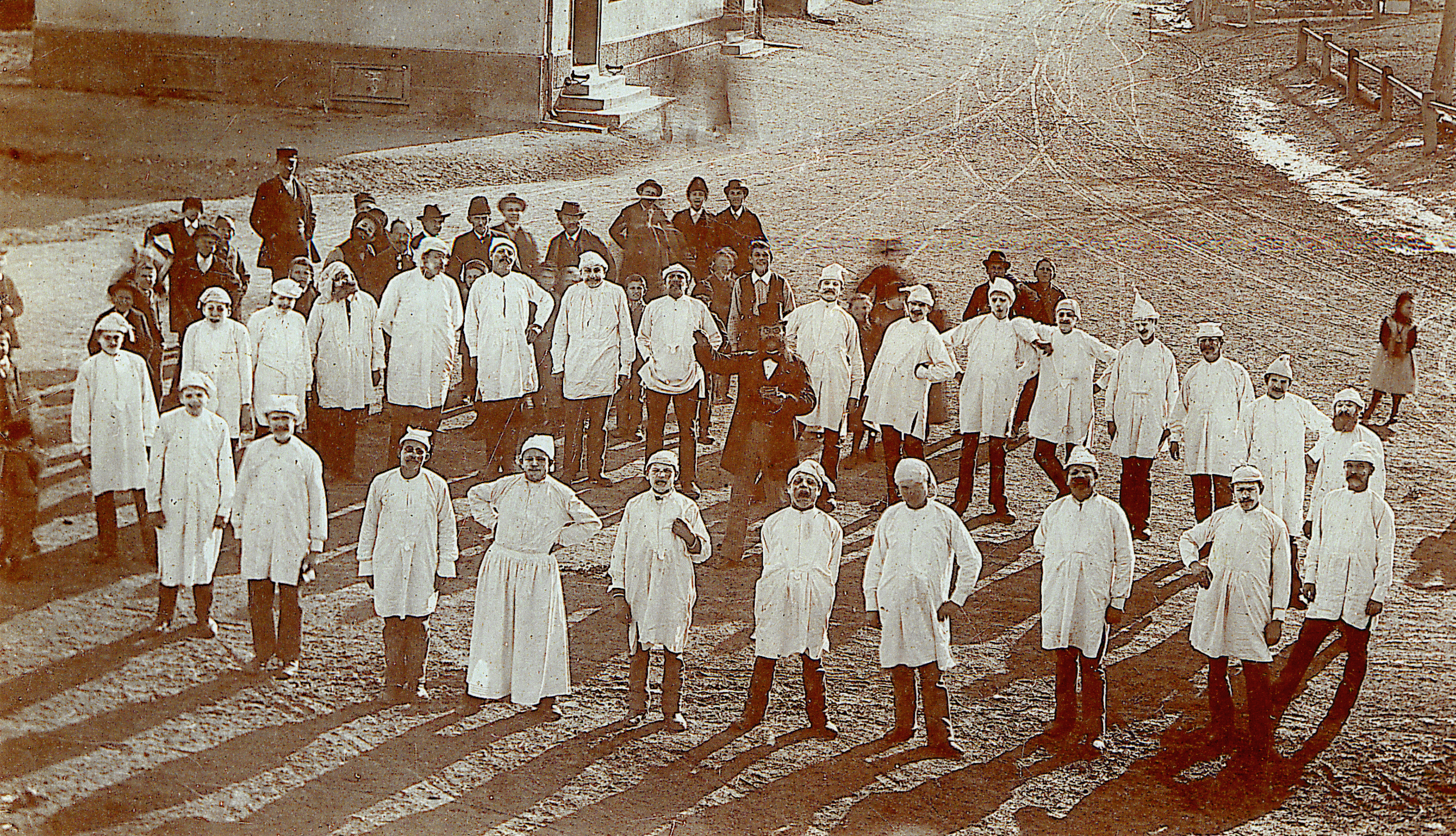 Mühlheim an der Donau, Fastnacht 1892, der gesungene Rügebrauch „Sagt er“, 1892